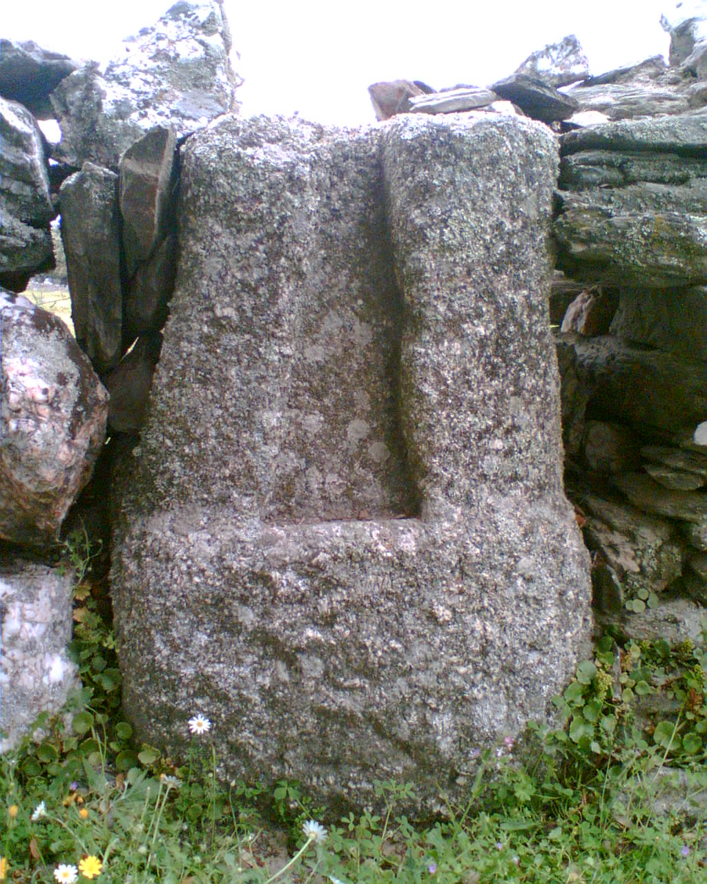 Poblado prerromano de Mailla en Talaván (Cáceres)